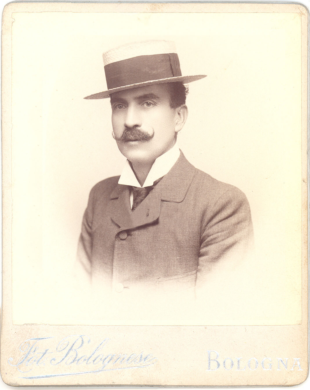 Ritratto di Achille Tellini